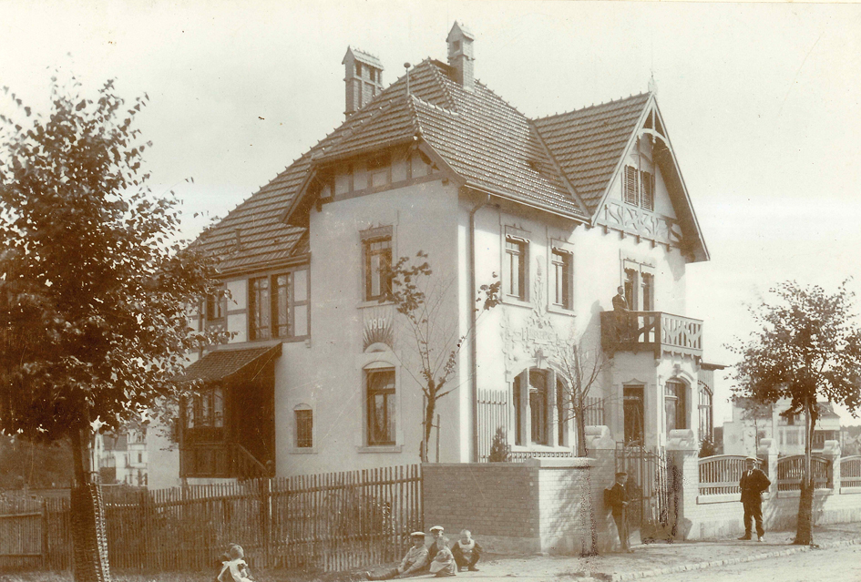 1900 Villa Ingeborg - Baumeister Gänzel auf dem Balkon 1. OG